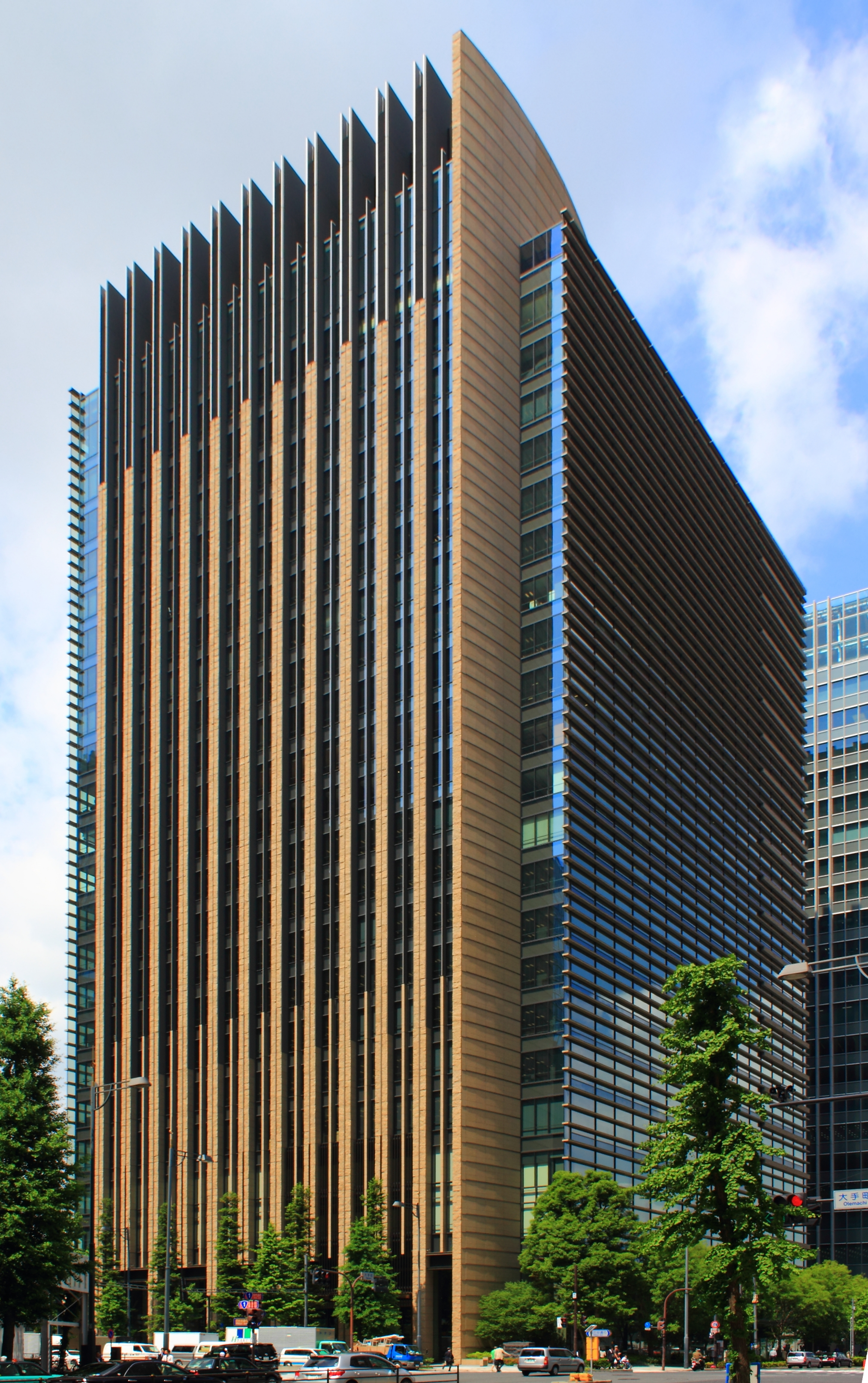 三井住友銀行本店（東京都千代田区）